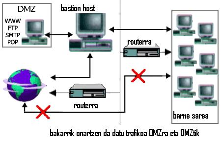 Screened subnet